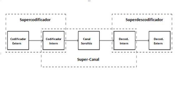 Com funciona la concatenació de codis FEC